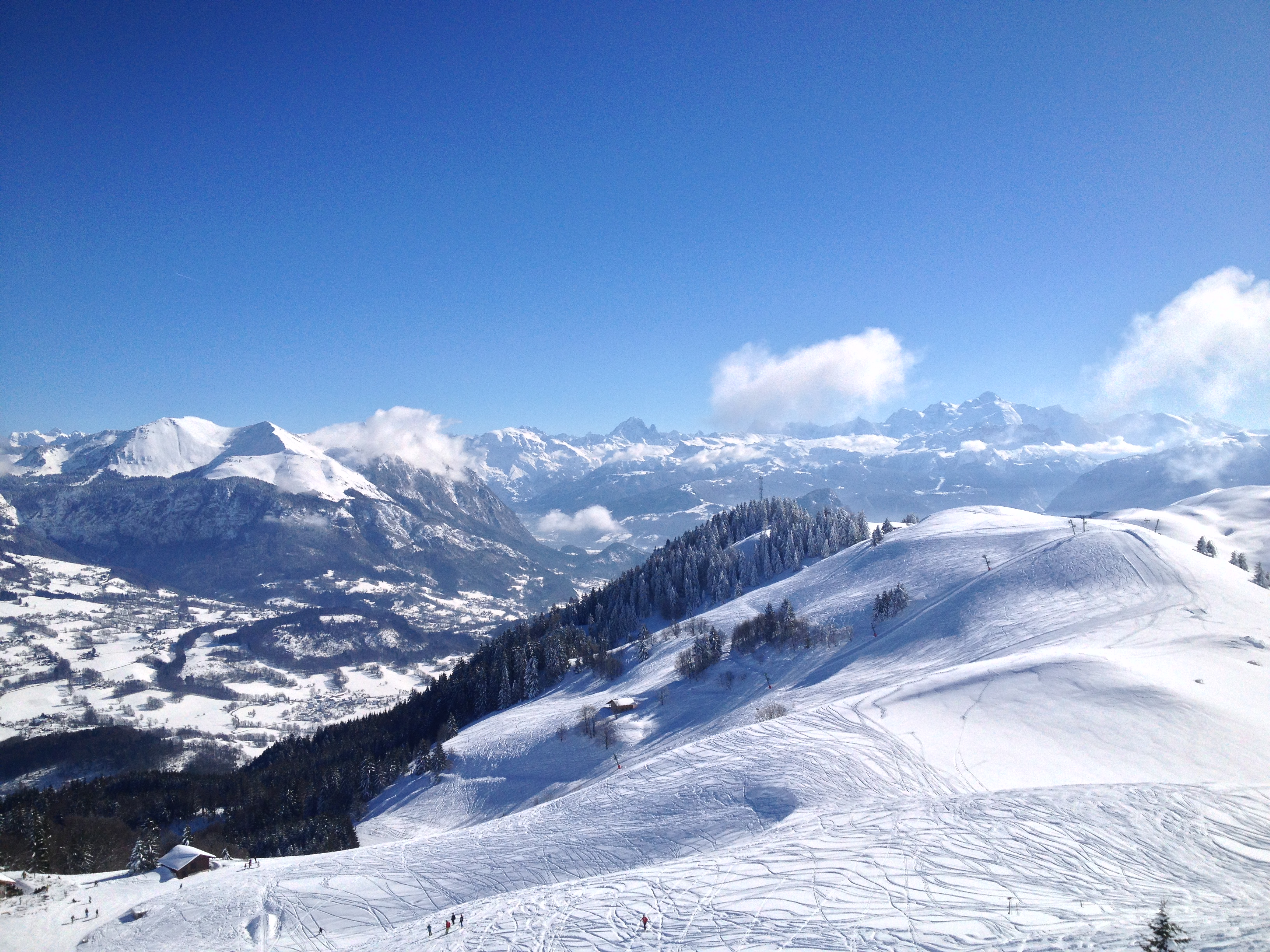 Vue de la station des Brasses.